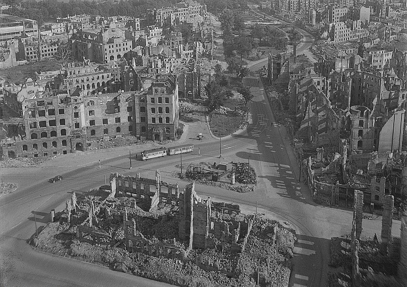 Original image description from the Deutsche Fotothek Blick vom Rathausturm zur Bürgerwiese